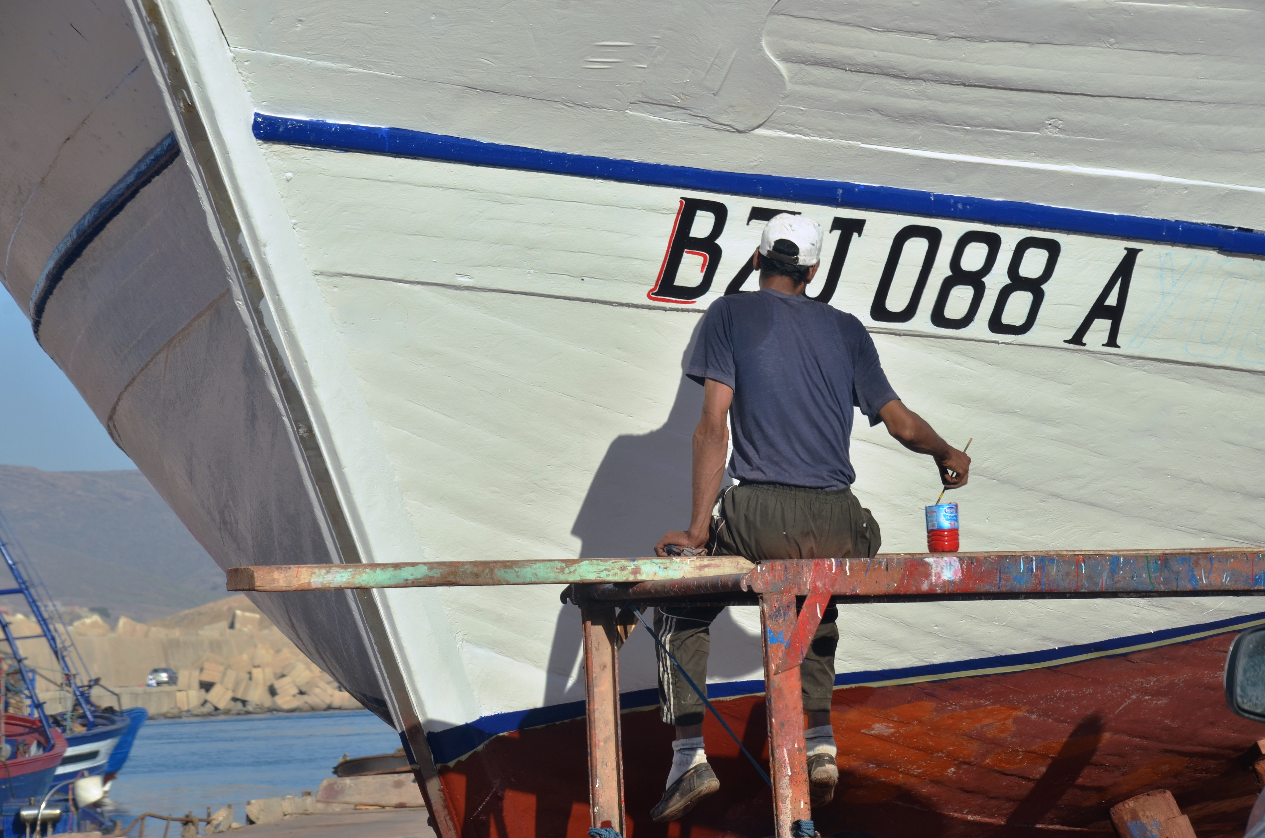 métier passionnant de retaper les navires This is an image of "African people at work" from Algeria